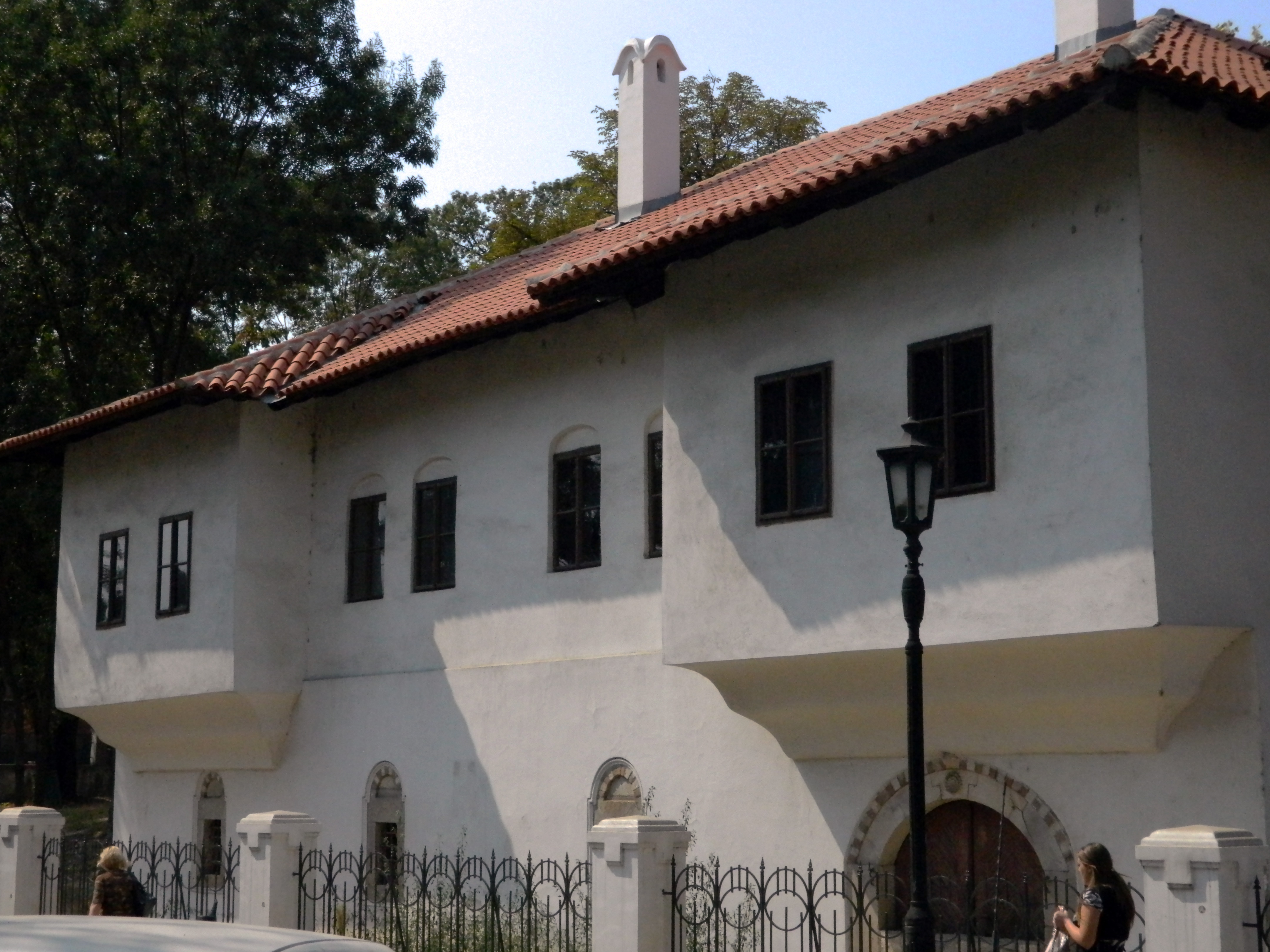 Mesto službovanja Sime MIlosavljevića Paštrmca, zvanog Amidža, savetnika kneza MIloša Obrenovića